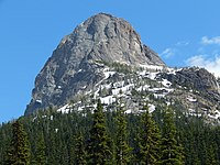 dağ